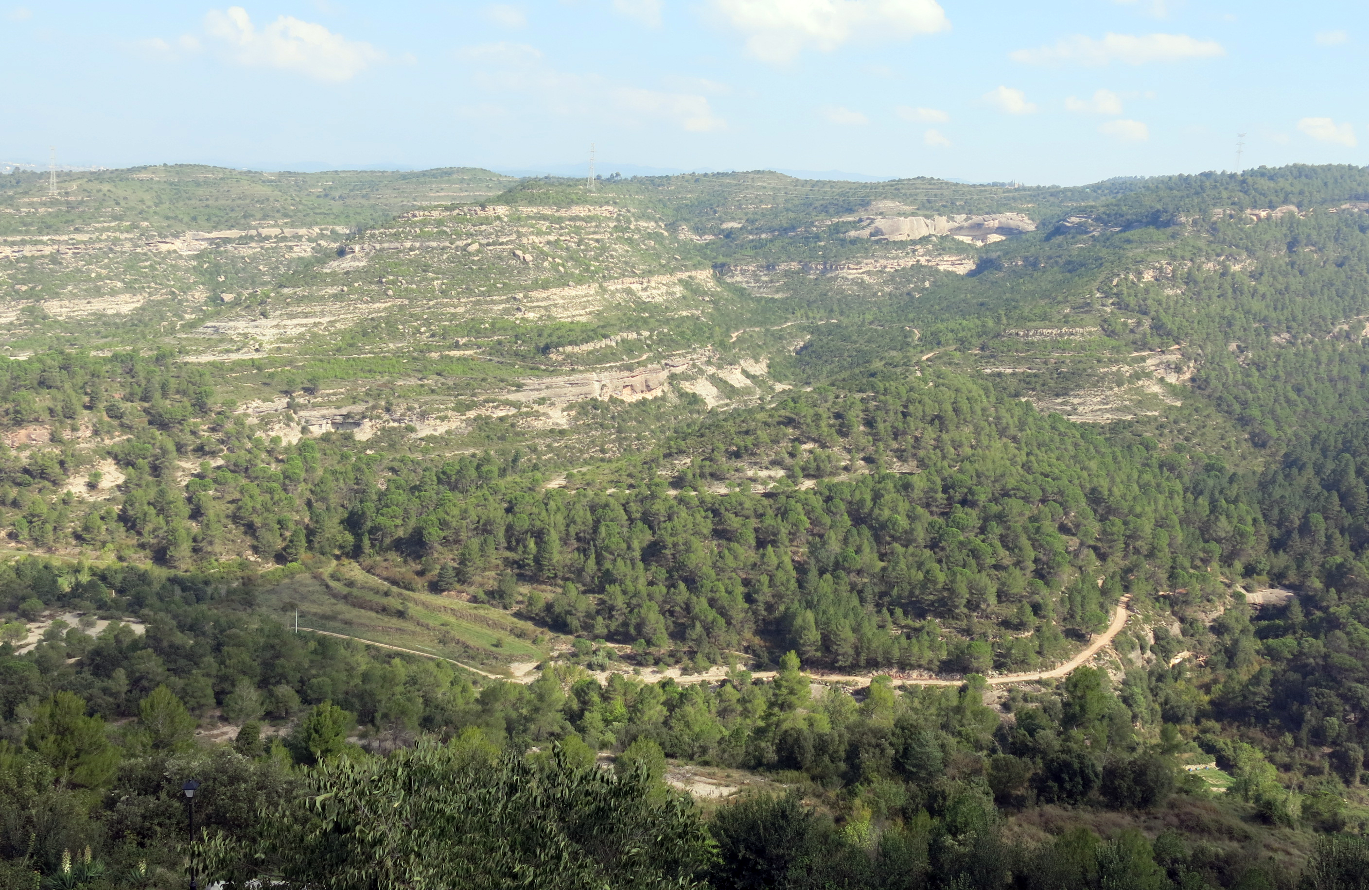 Riera de Talamanca i torrent de la Font dels Pets, escenari de la Batalla de Talamanca